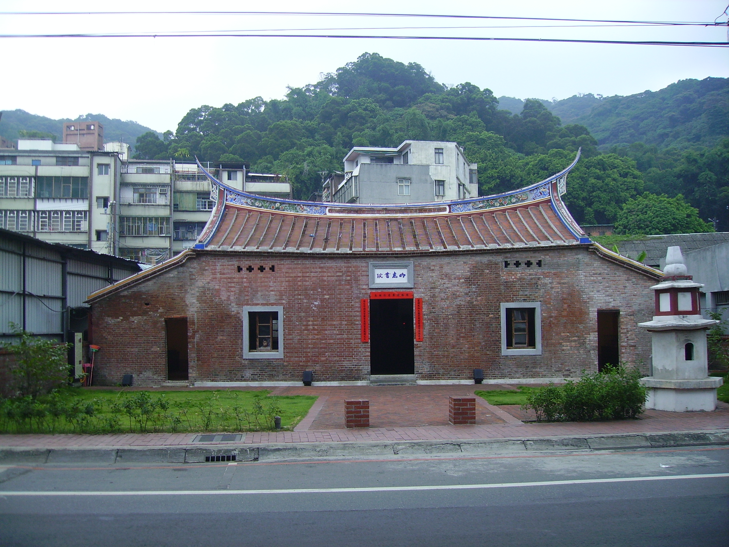 新北市泰山區明志書院。